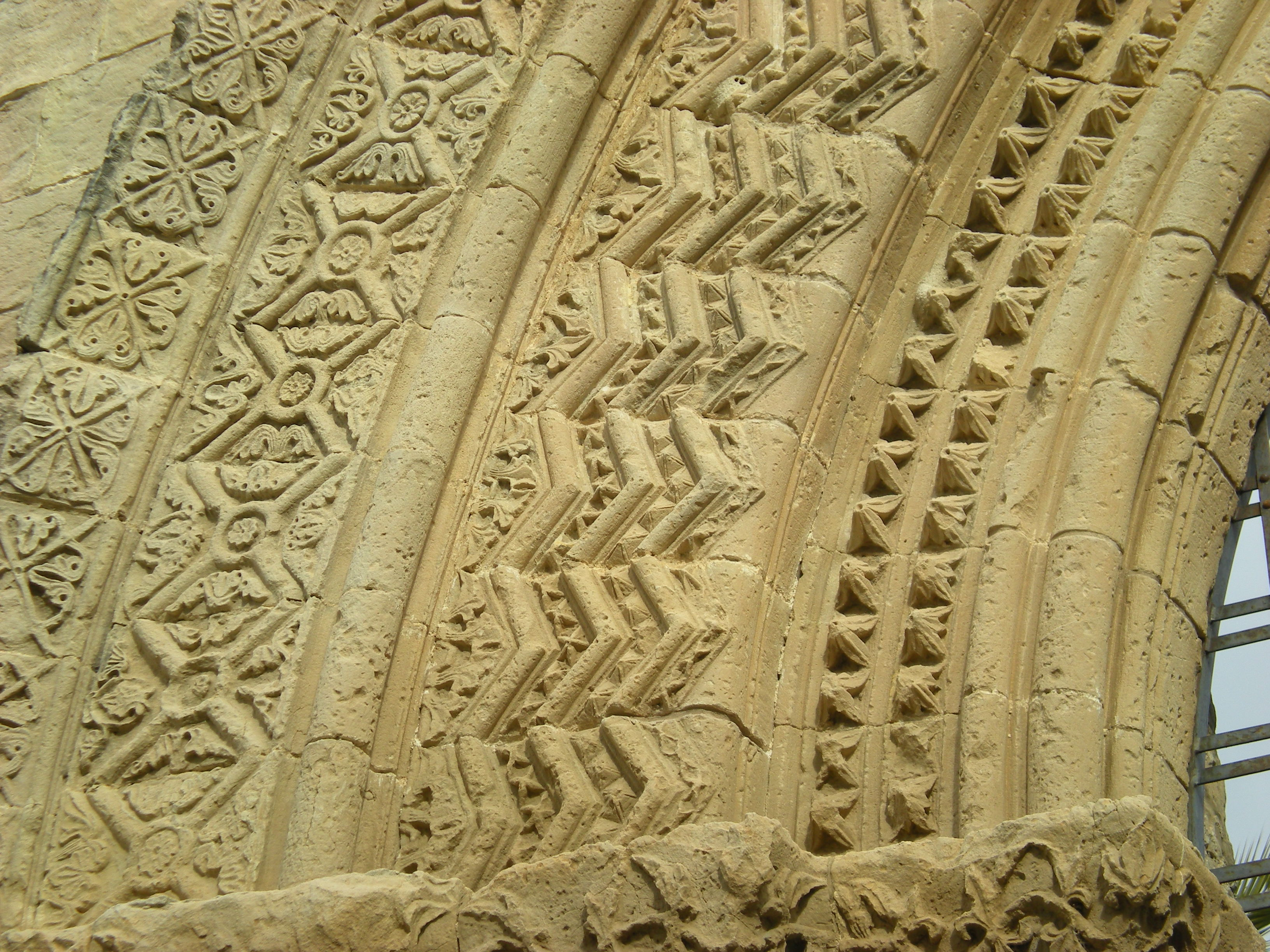 Portale Gotico Chiaramontano